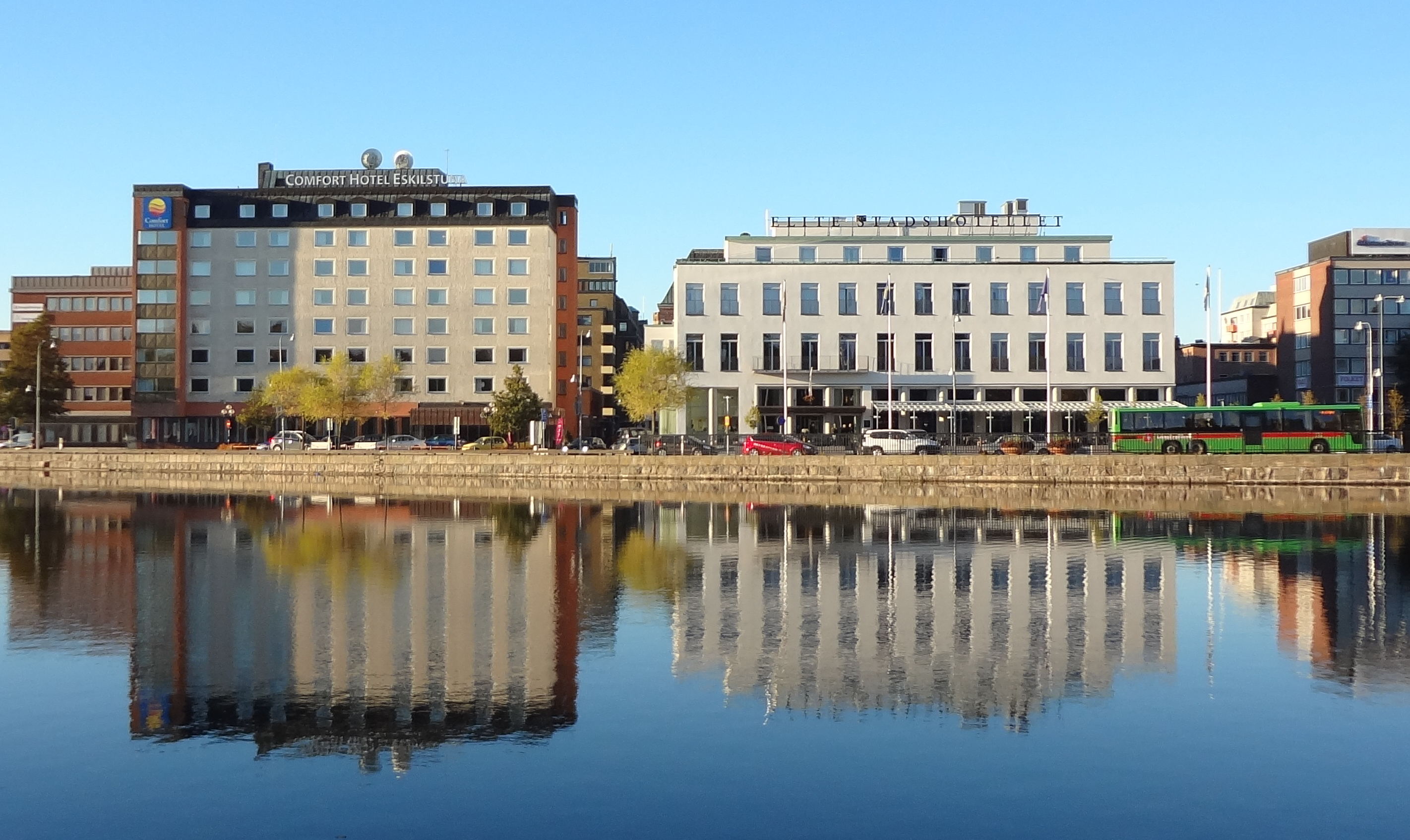 Hottel Statt/Clarion hotel i Eskilstuna.